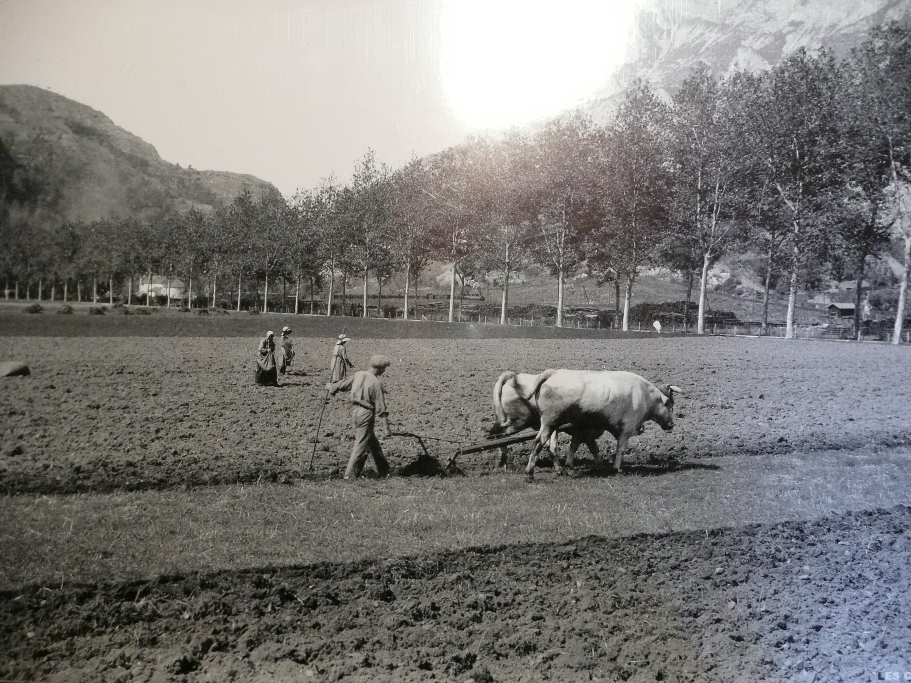 Scène de labour aux Cabannes au début du XXe siècle.